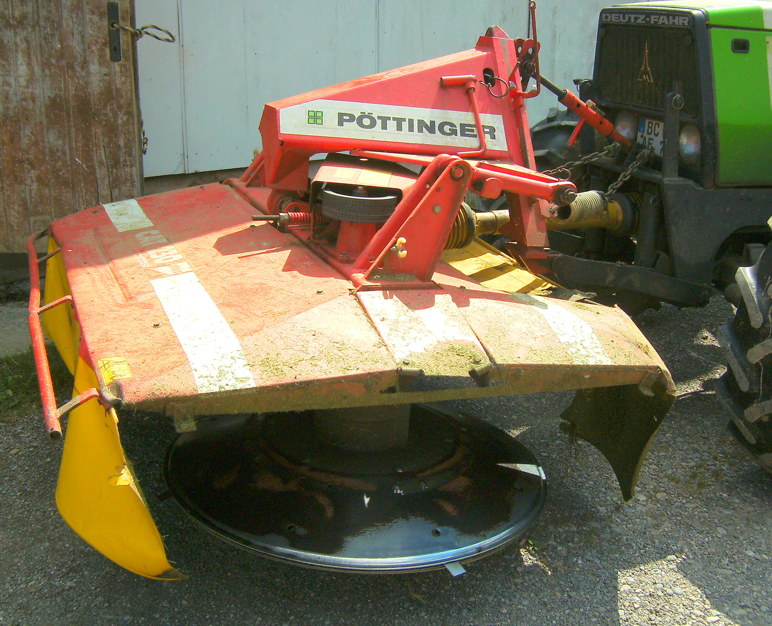 Pöttinger-Mähwerk CAT 230 Plus mit Multitast-Anbaubock; mit einem Weiste-Dreieck am Frontdreipunkt eines Deutz-Fahr-Traktors angebaut und über eine Gelenkwelle mit dem Nebenantrieb verbunden